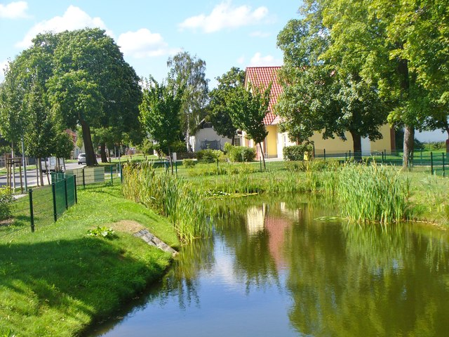 Kleinbeeren - Dorfteich (Village Pond)